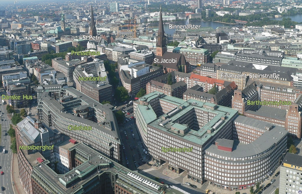 Kontorhausviertel Hamburg, Die weiß geschriebenen Gebäude gehören nicht zum Kontorhausviertel und sind nur zur weiteren Orientierung vermerkt.